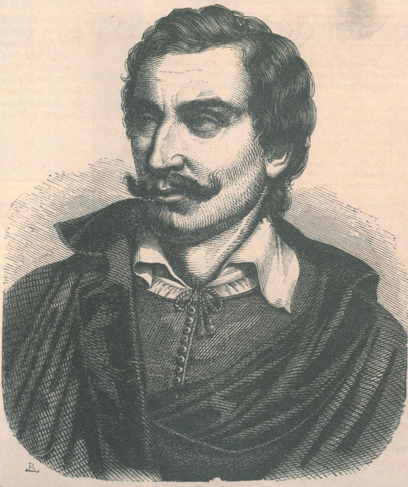 Es handelt sich um einen Holzschnitt aus dem 19. Jahrhundert, der Jacob van Ruisdael zeigen soll. Der Scan stammt aus dem Heft: Maler - Leben, Werk und ihre Zeit. Band 68. Ruisdael. Marshall Cavendish Ltd., Hamburg 1987 (ohne ISBN)